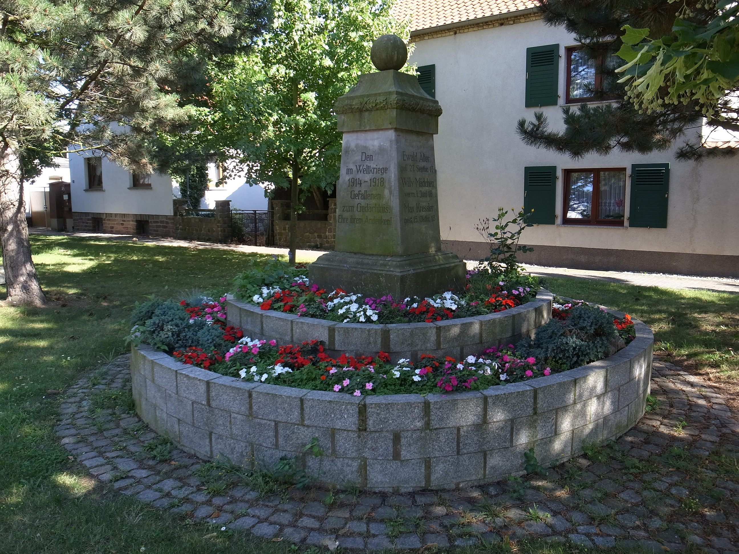 Bitterfeld-Wolfen, Ortsteil Zschepkau, Kriegerdenkmal (Baudenkmal im Denkmalverzeichniss Sachsen-Anhalt, Erfassungsnummer: 094 95447 000 000 000 000 [1])